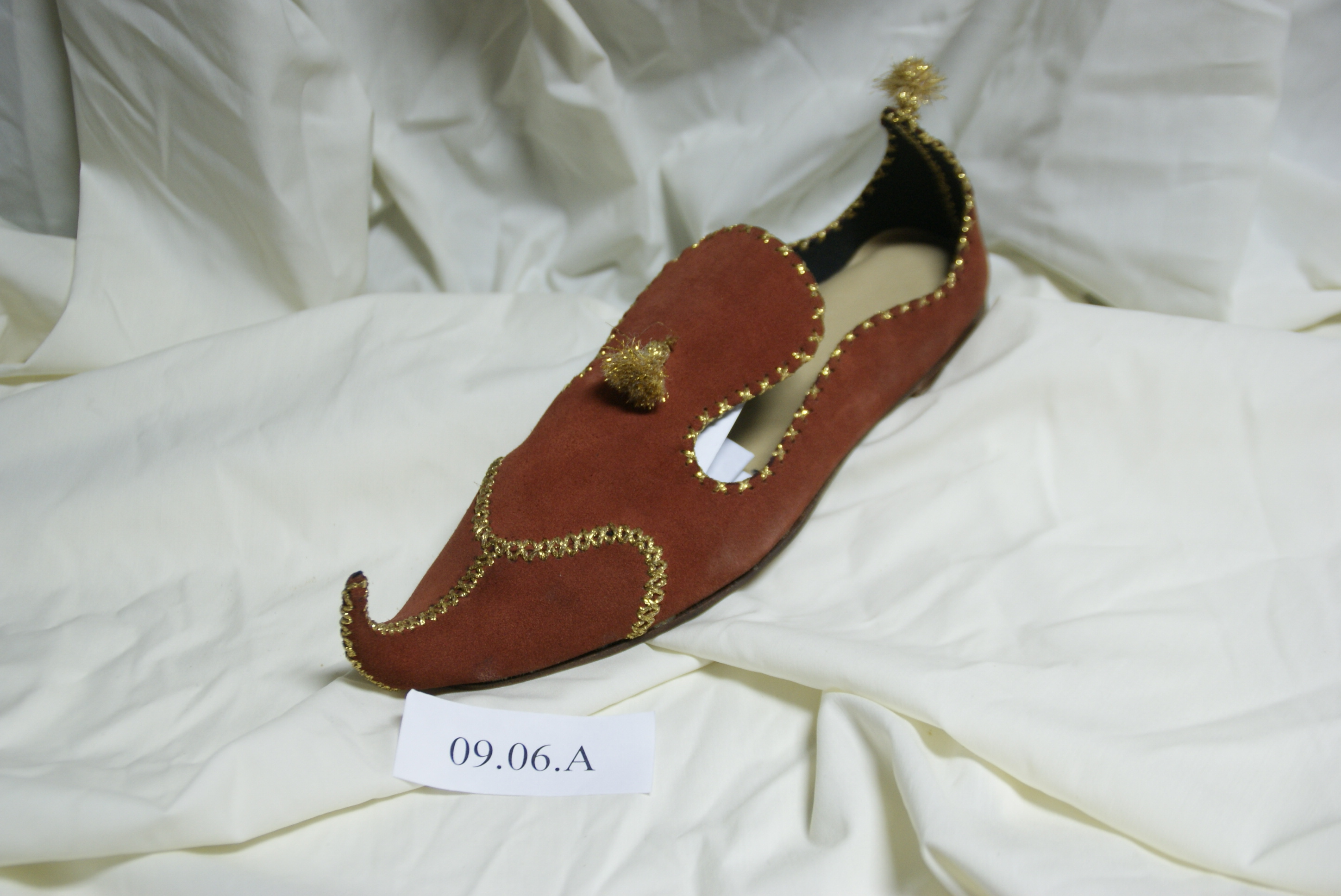 chaussure homme traditionnel